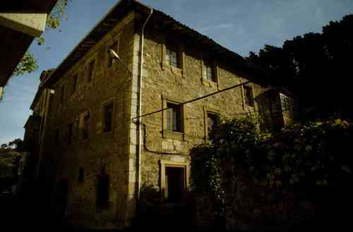 Fotografía tomada en 1987 en Deba (Gipuzkoa)